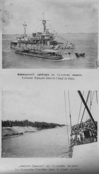 Русский экспедиционный корпус. Фотоальбом. Описание - на фотографии